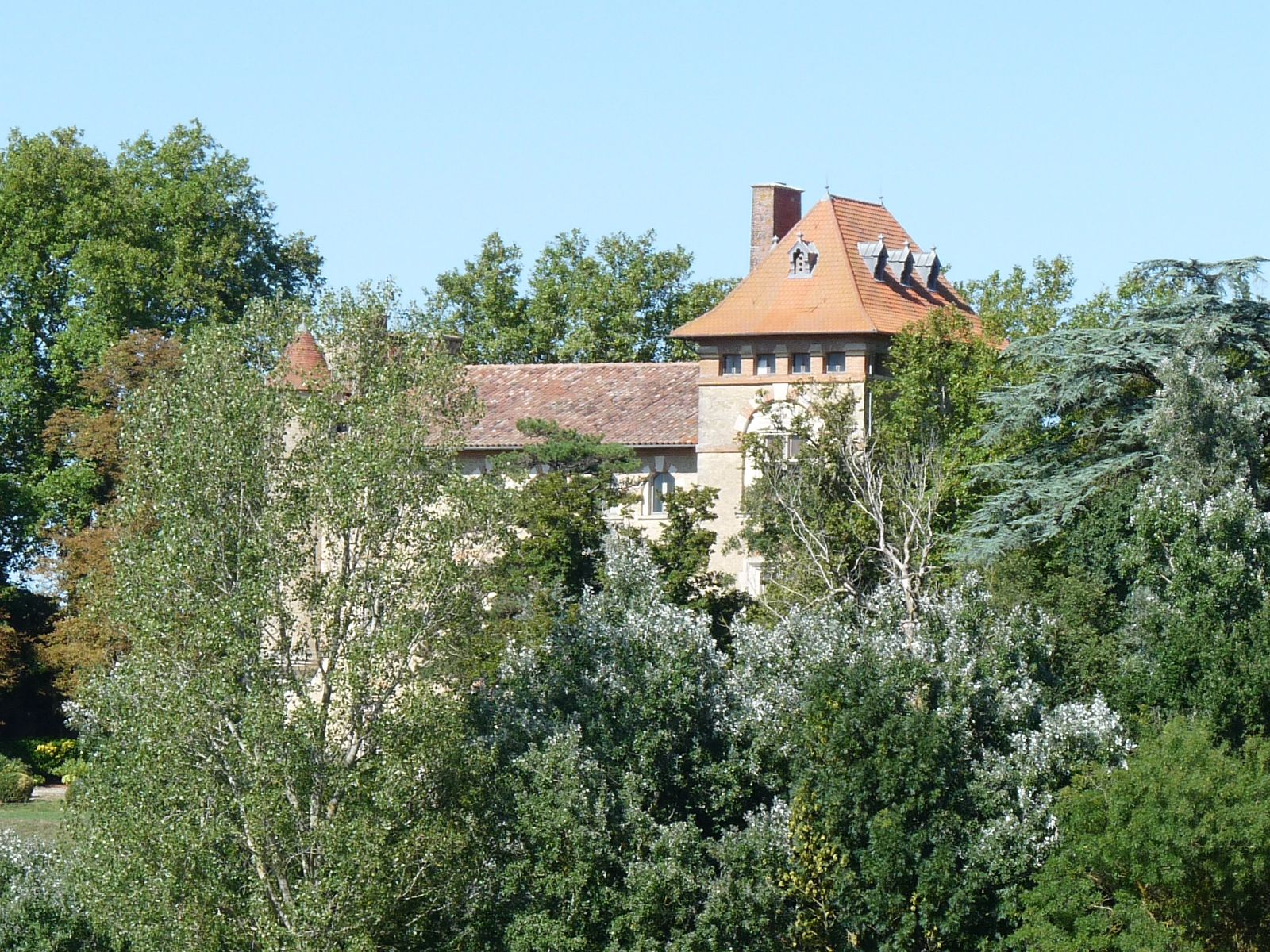 Château de Cambiac, Haute-Garonne, France